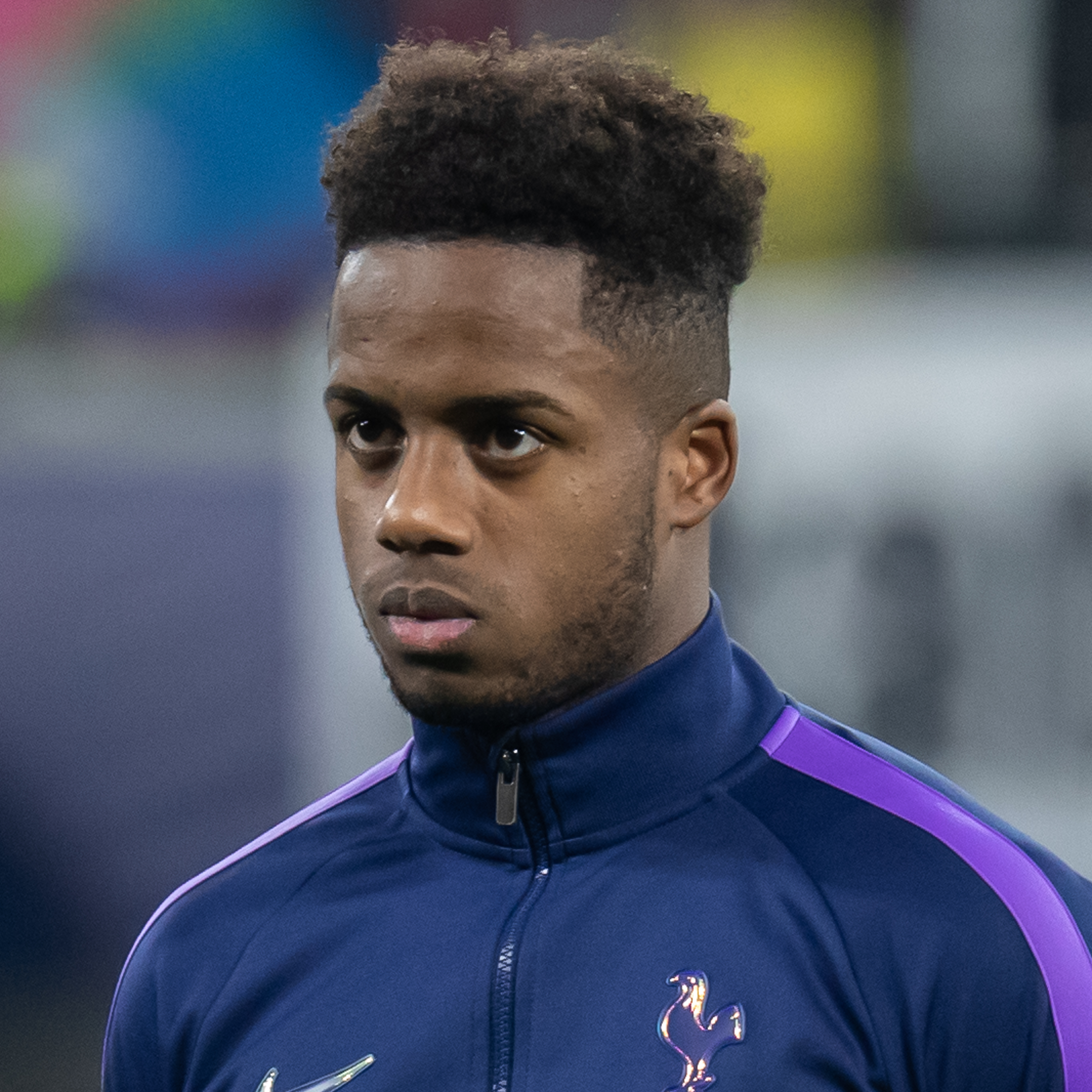 Fußball, Männer, UEFA Champions League Achtelfinale, RB Leipzig - Tottenham Hotspur; Kouassi Sessegnon (Tottenham Hotspur, 19)